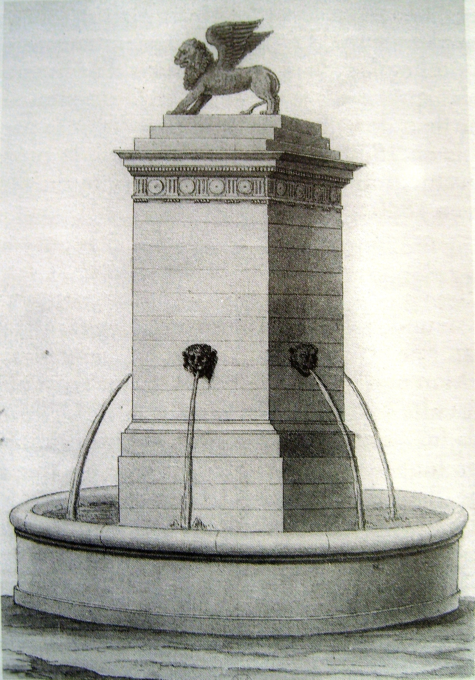 Detail of File:Fontaine des Invalides.jpg